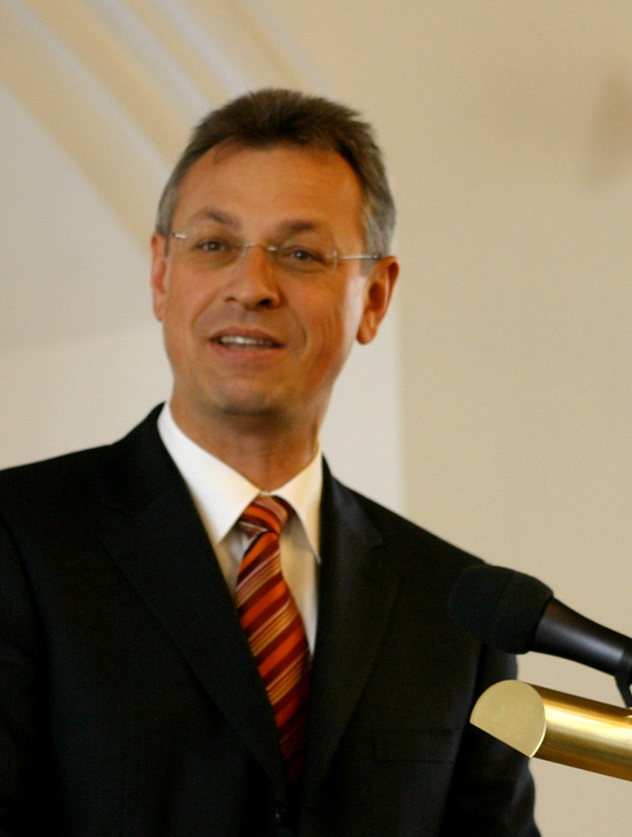 Siegfried Schneider, CSU-Politiker, seit 2005 Bayerischer Staatsminister für Unterricht und Kultus.